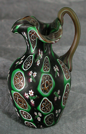 Fratelli Toso Pitcher, ca. 1900